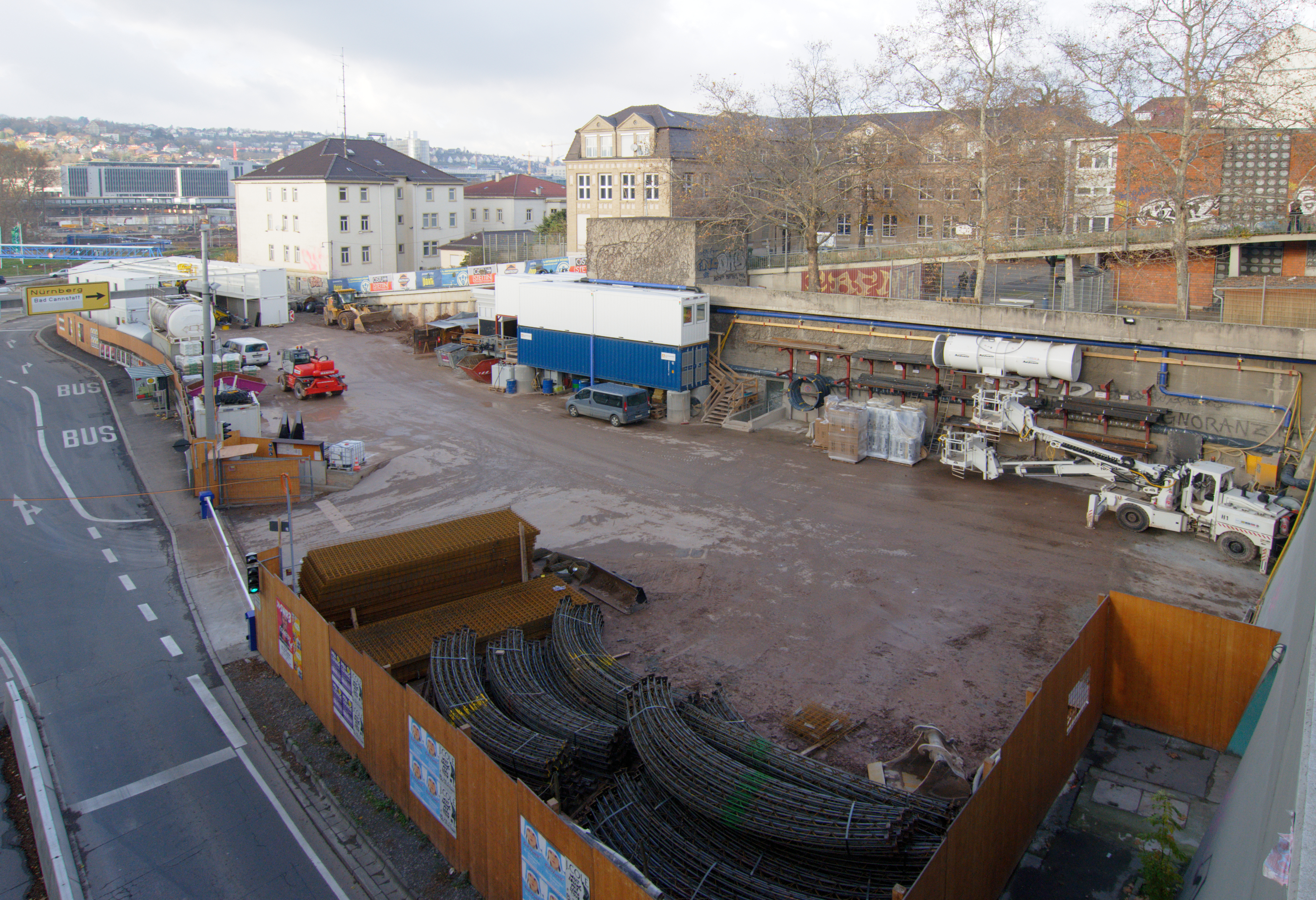 Baustelle für den Fildertunnel vor dem Wagenburgtunnel in Stuttgart